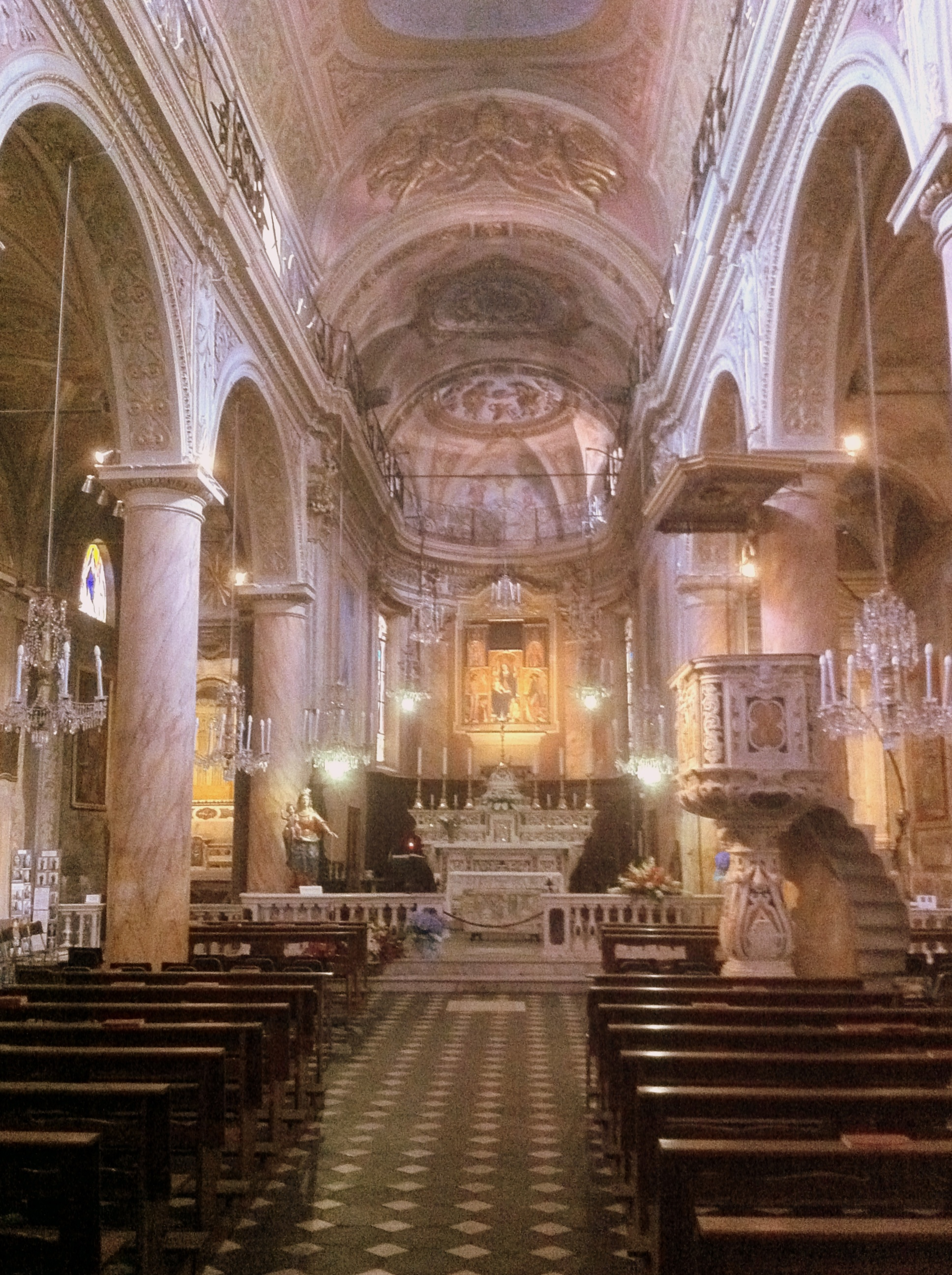 Concattedrale di San Pietro di Noli (SV) Italy